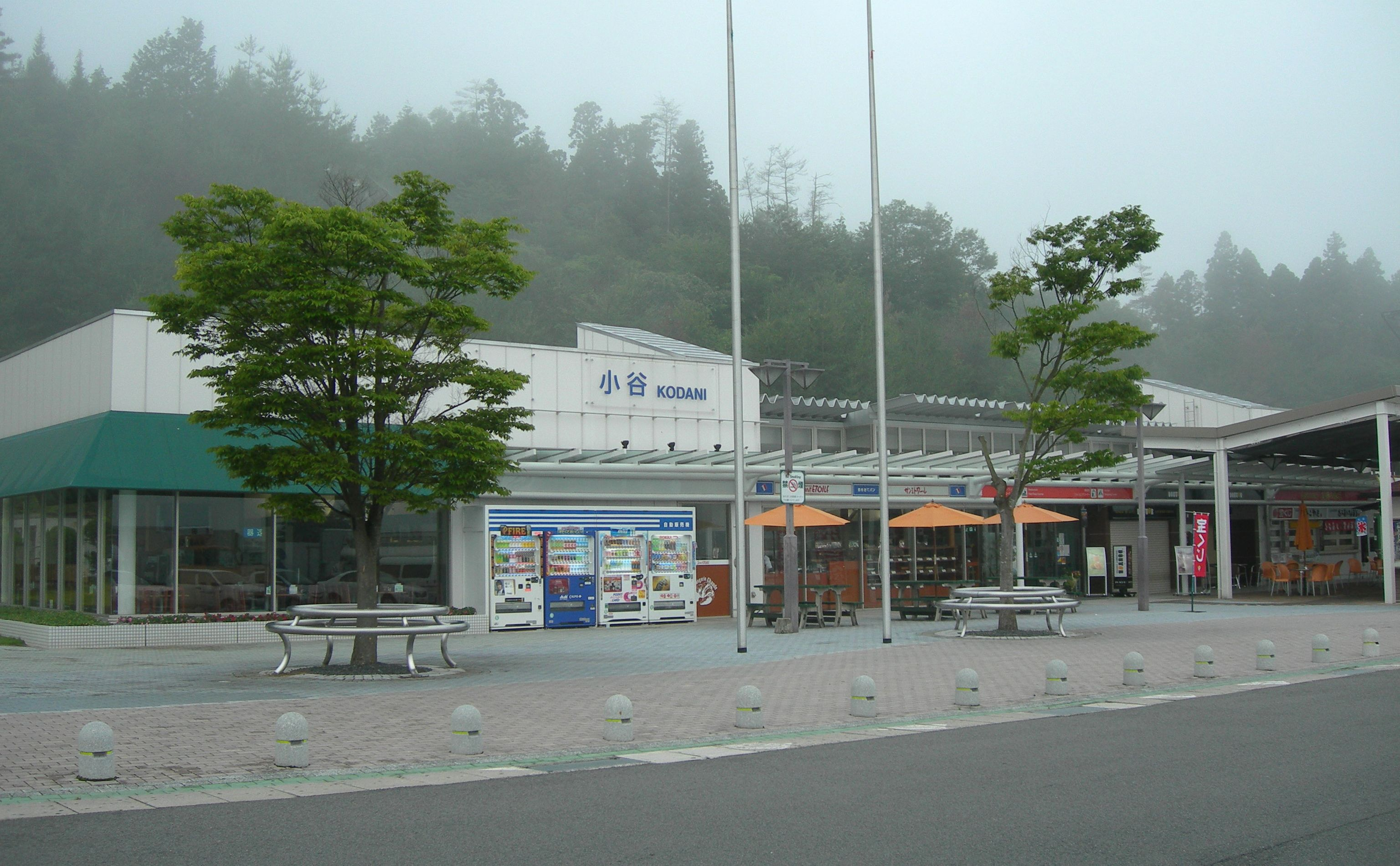 山陽自動車道 小谷サービスエリア（山口方面）施設